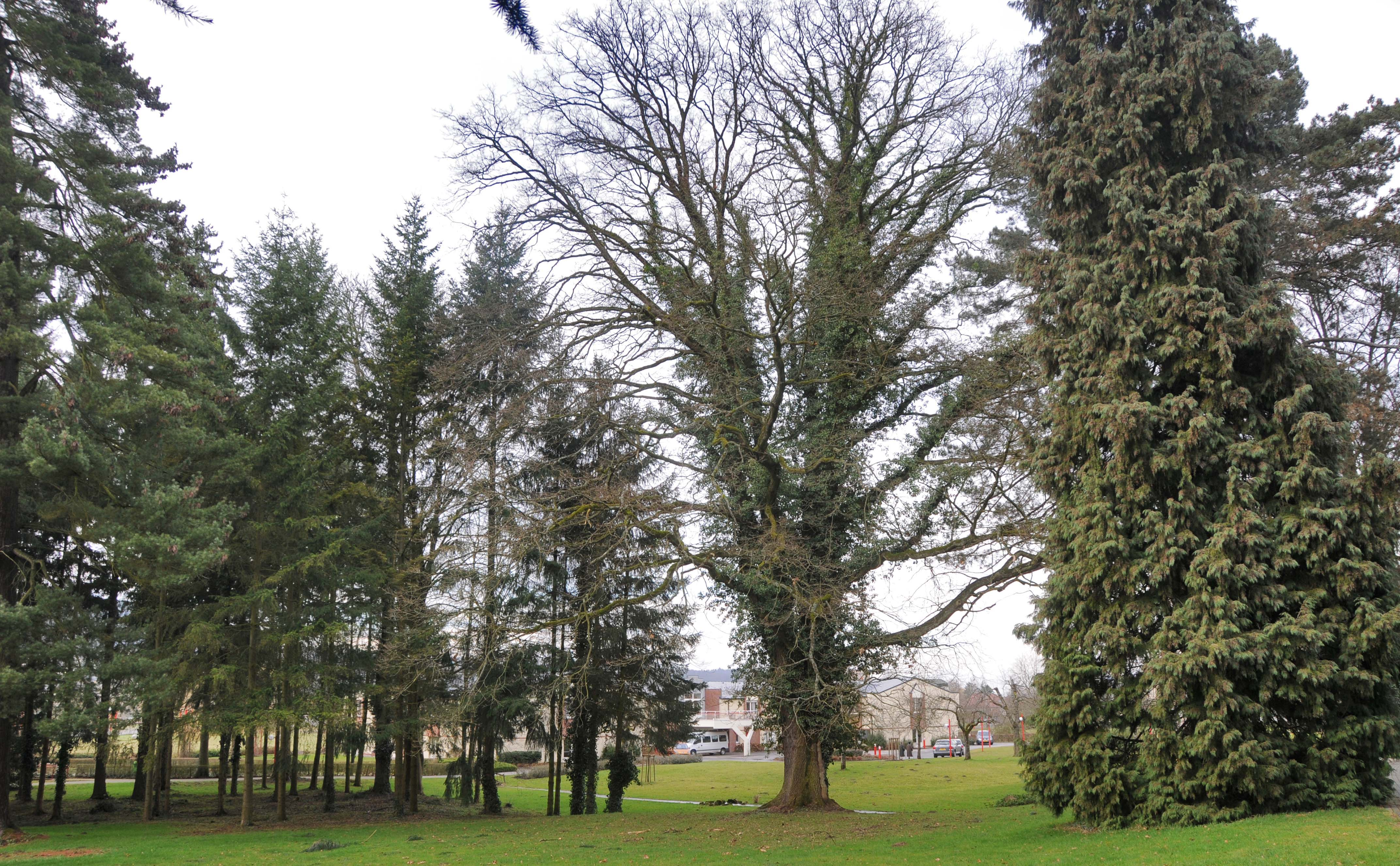 Eech am Park zu Heeschdref.